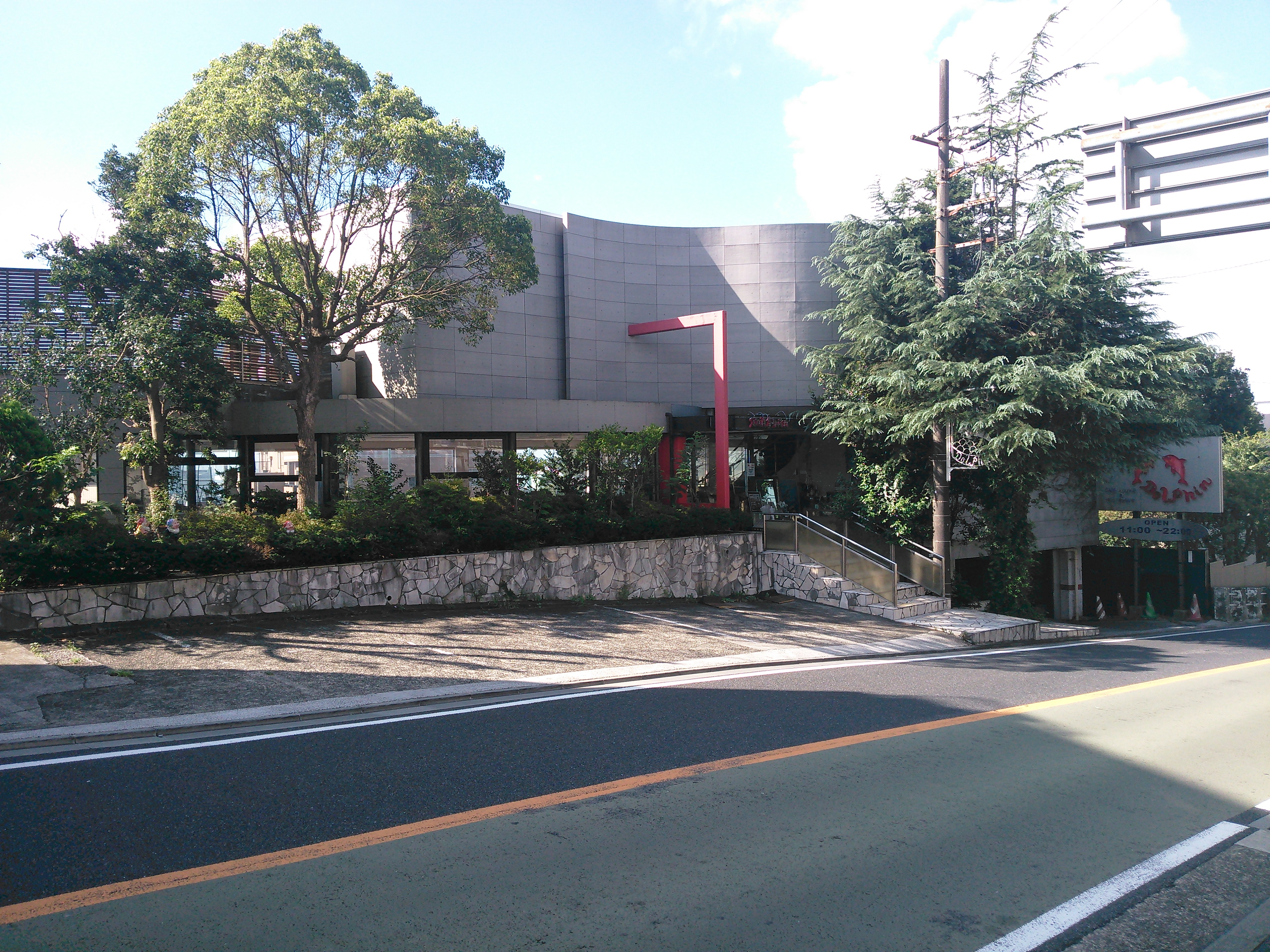 横浜市中区根岸旭台、荒井由実の『海を見ていた午後』で歌われたレストラン「ドルフィン」